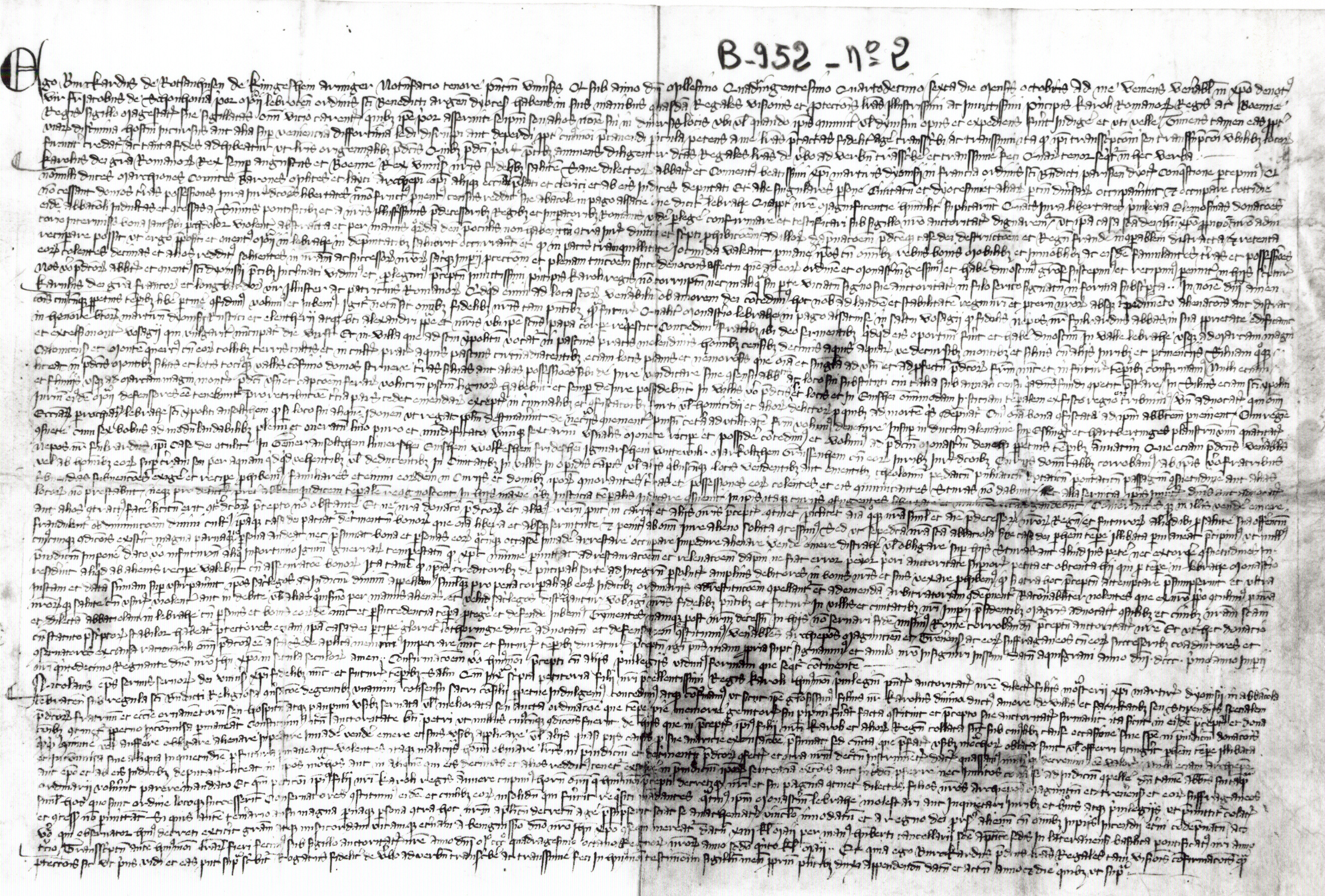 Vidimus par Burchard de Rathsamhausen de Kunigesheim (Kintzheim) d'un diplôme de Charlemagne de 801, d'une charte de l'empereur Charles IV de 1348 et d'une bulle de Nicolas Ier en faveur du prieuré de Lièpvre, 1444. Original sur parchemin